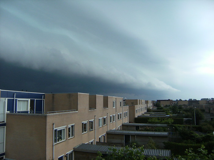 Een schelfcloud, gevolgd door onweer, nadert Zwolle, Nederland op 26 Juli 2008